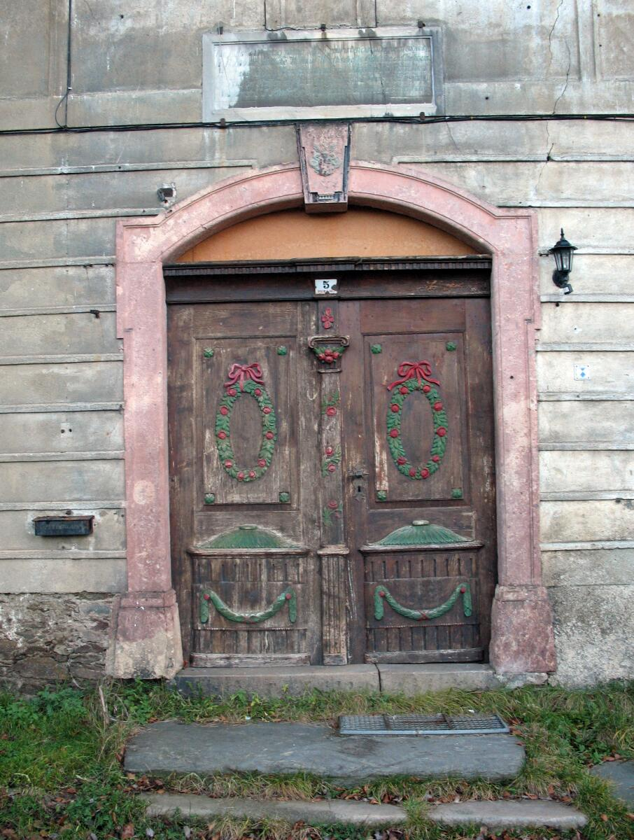 Front door of Pfeilhammer manor / Eingangsportal der Herrenhauses Pfeilhammer